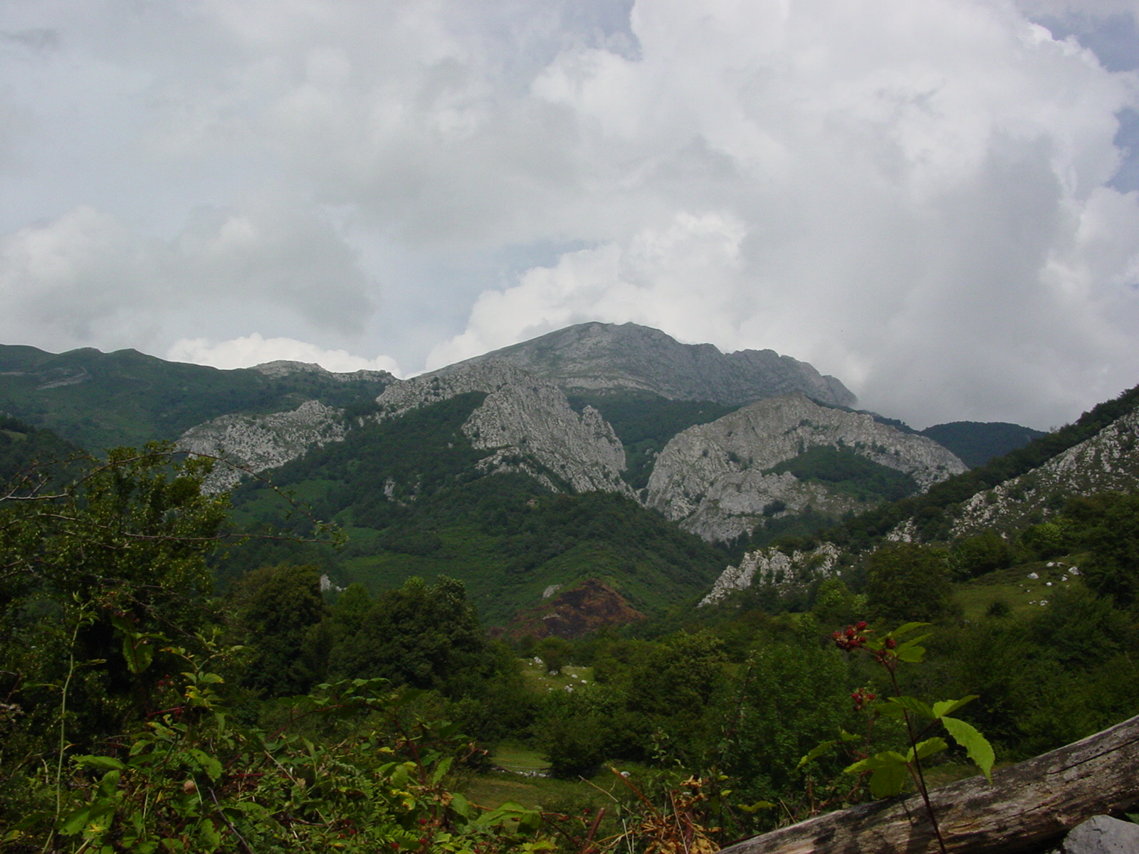 Vista del Tiatordos desde la aldea de Pendones